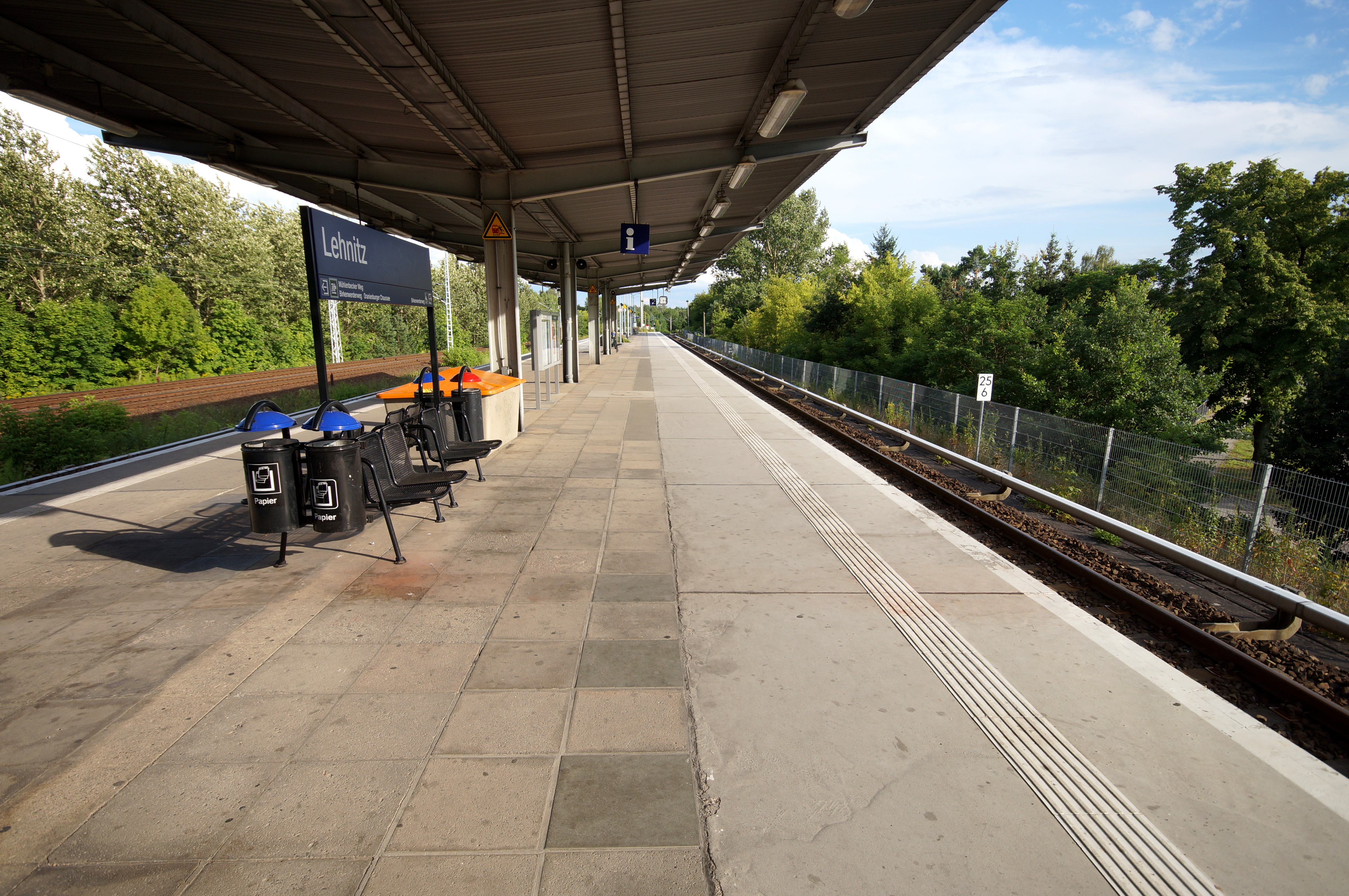 Die Bahnsteige des Lehnitzer Bahnhofs in Oranienburg